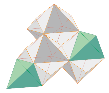 閃亜鉛鉱型